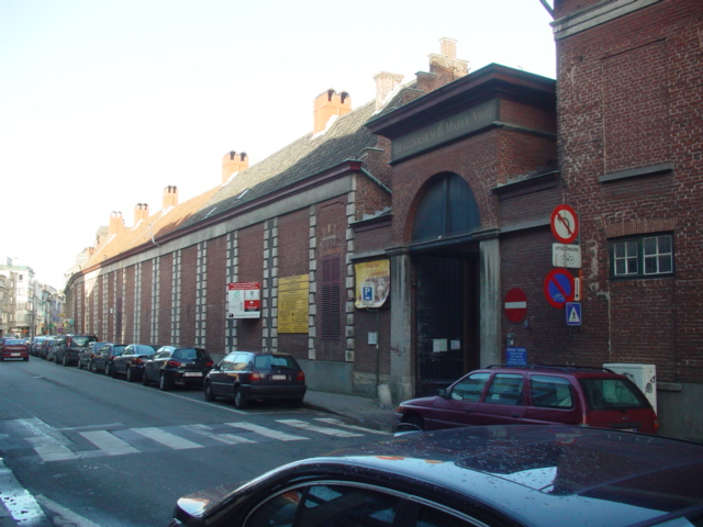 Beguinage Ter Hoyen, Ghent (Belgium)